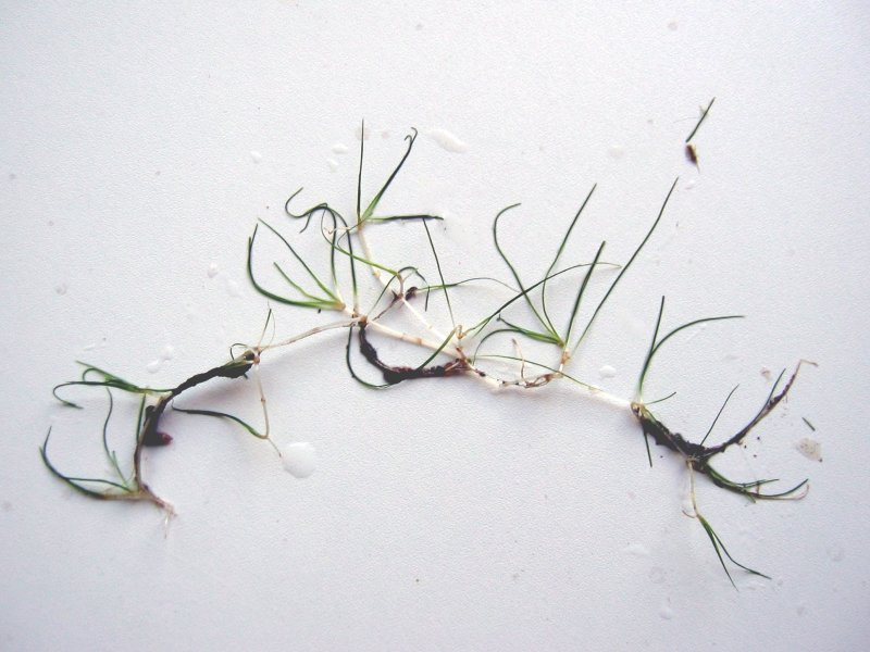 Sumpf-Teichfaden Zannichellia palustris, Müritz-Gebiet